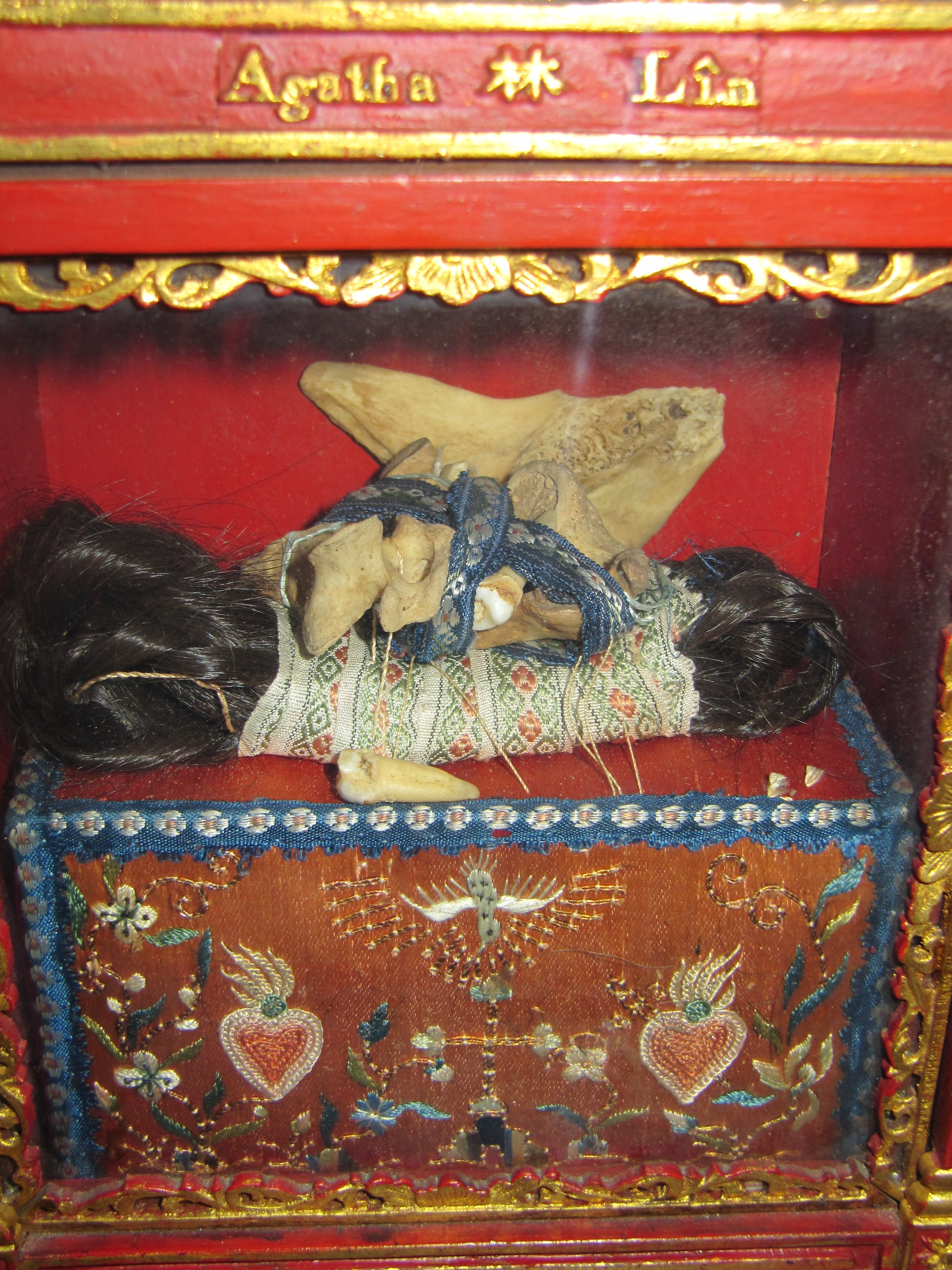 Мощи святой Агаты Линь Чжао, музей "Дом Паулины Жарико", Лион, Франция